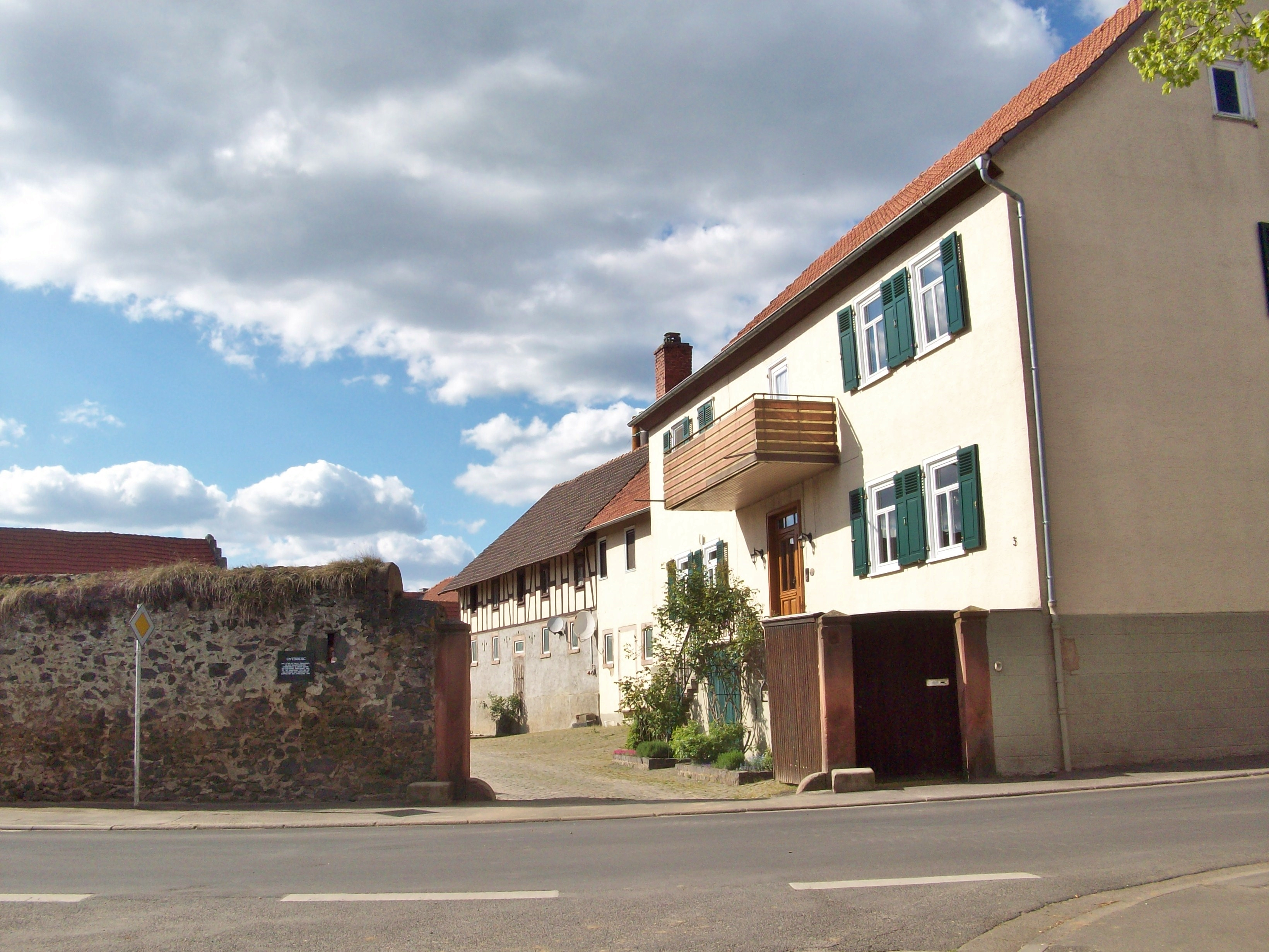 Hofeingang zur ehemaligen Unterburg in Bellersheim. Links Burgmaier mit Schießscharte und Erklärungstafel, rechts das im 19. Jahrhundert wiederaufgebaute Herrenhaus (Haupthaus)